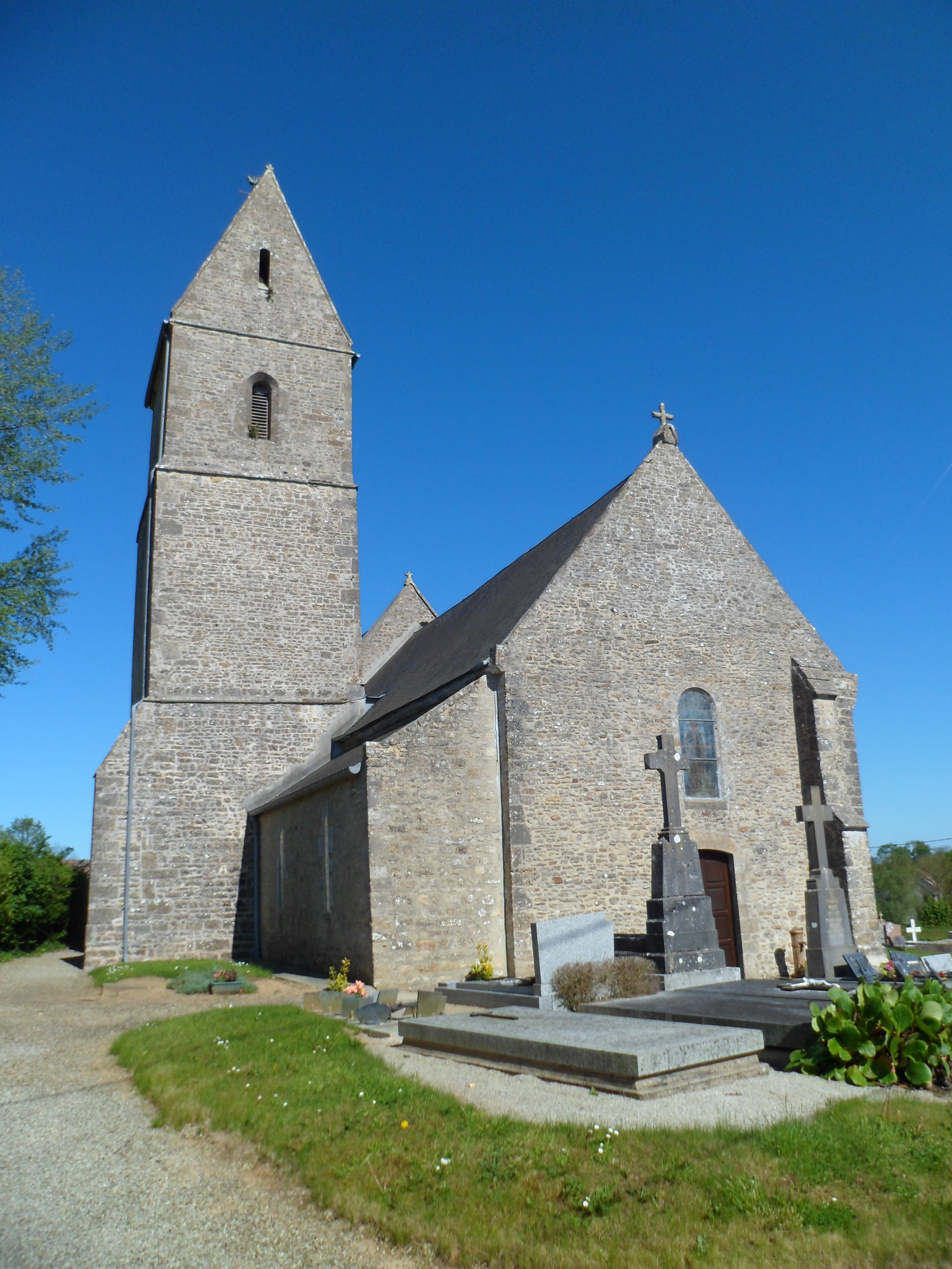 Église Saint-Jean-Baptiste d'Houtteville